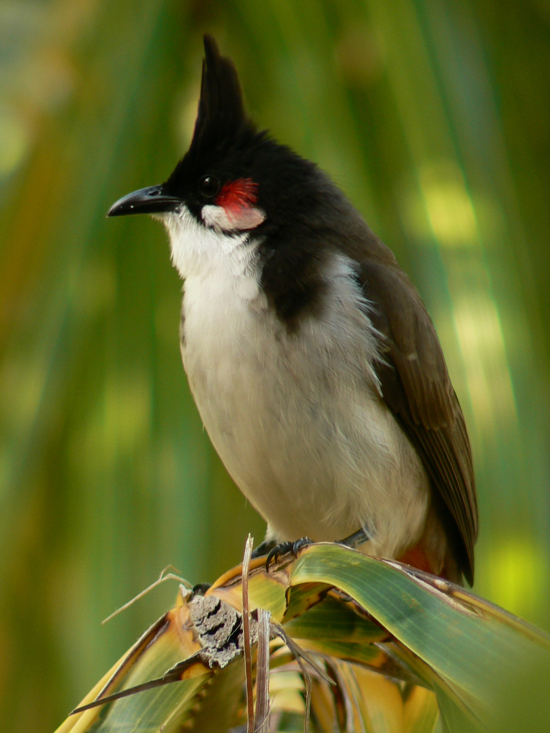 Rotohrbülbül Pycnonotus jocosus, Mauritius